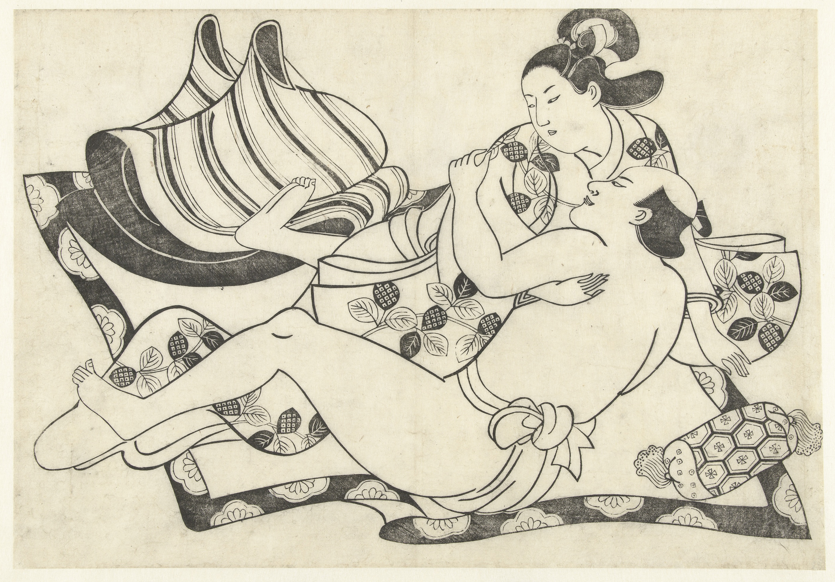 Japanse man en vrouw op het punt de liefde te bedrijven op een kleed. De man is gekleed in enkel een lendendoek, de vrouw in kimono. Op de voorgrond rechts een kussen, in de achtergrond links de afgeworpen kleding van de man. Label Line: Sugimura Jihei, ca. 1690, houtsnede Collection: prenten; Japan (collectie)